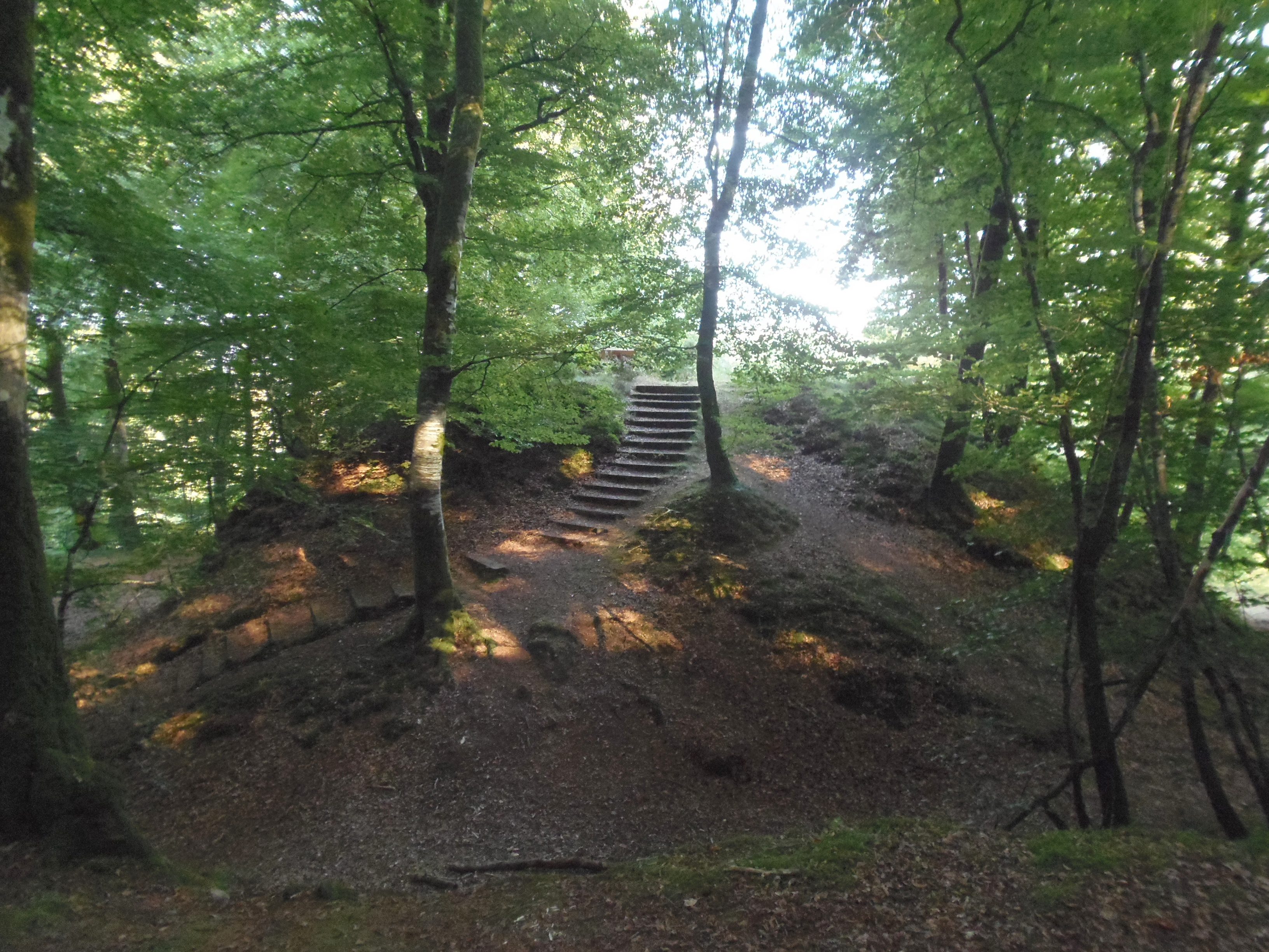 Saint-Sever-Calvados (Normandie, France). La motte castrale du Vieux Château.